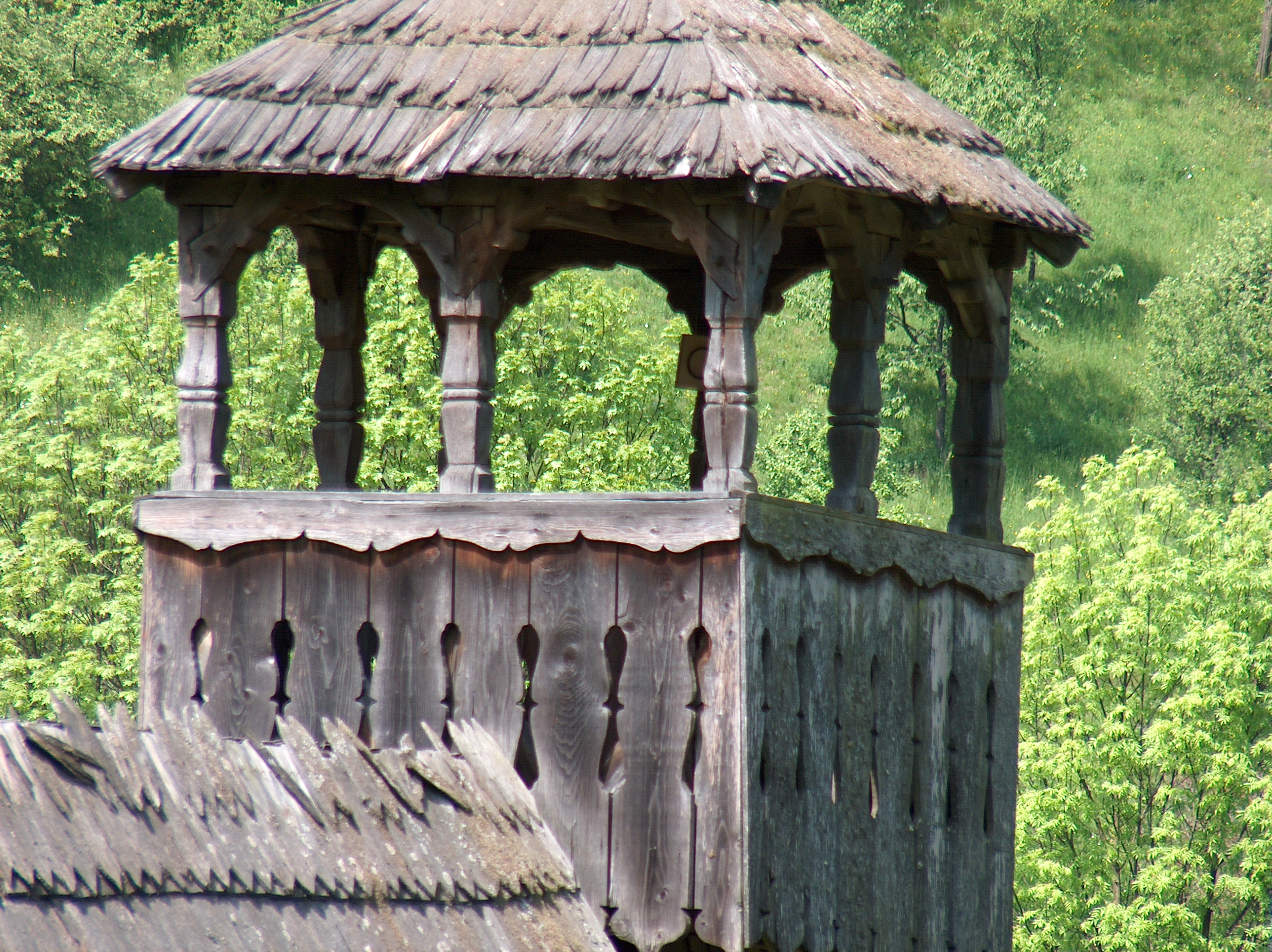 Biserica de lemn din Gersa, comuna Rebrişoara, judeţul Bistriţa Năsăud. Turnul bisericii-Galeria.